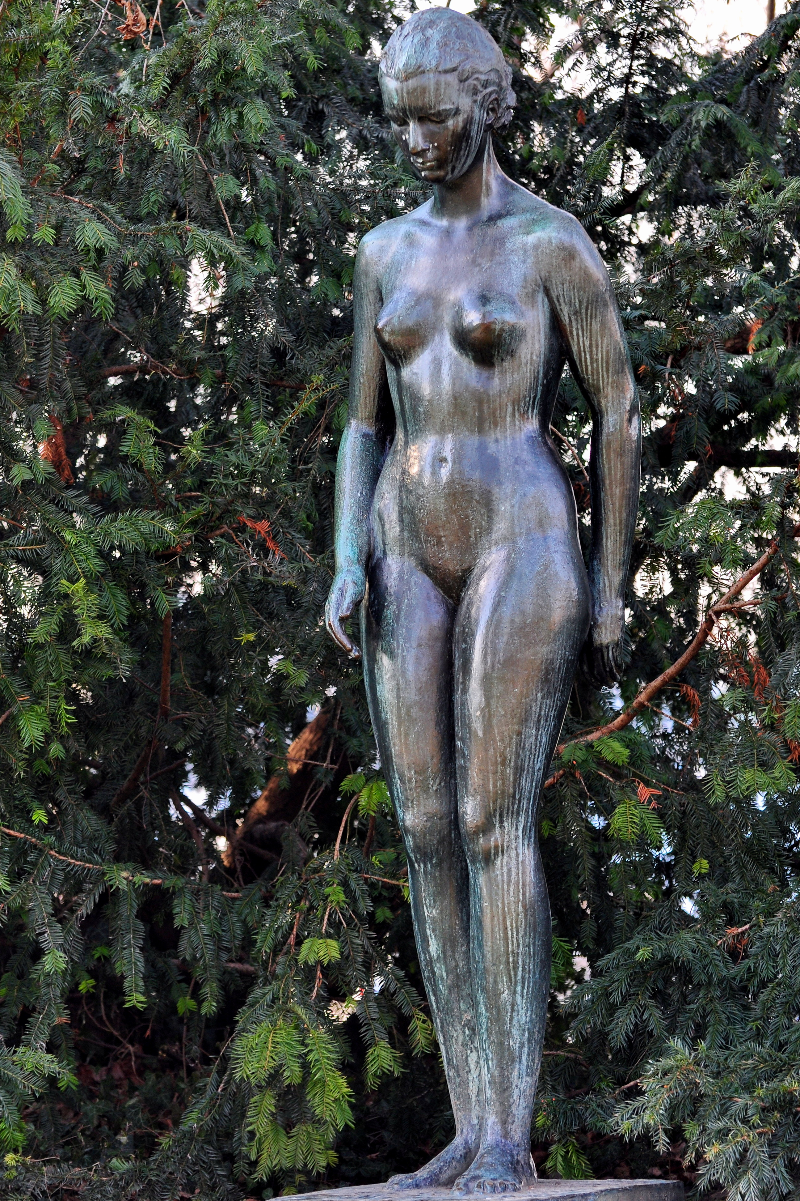 "Andacht" (Meditation; 1931) by Carl Albert Angst (1875-1965). Zürichhorn in Zürich-Seefeld (Switzerland)